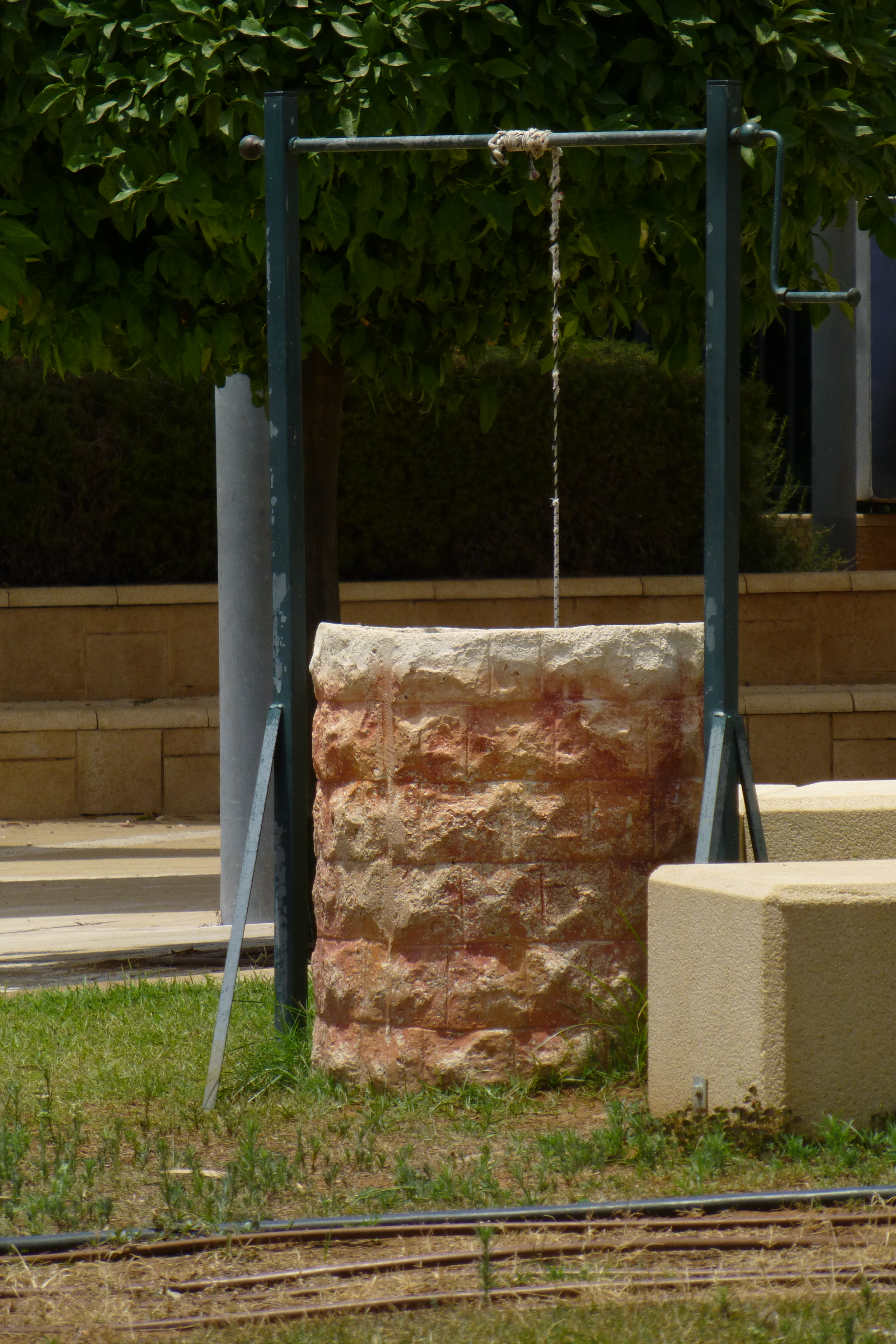 רח' סוקולוב 17, נתניה